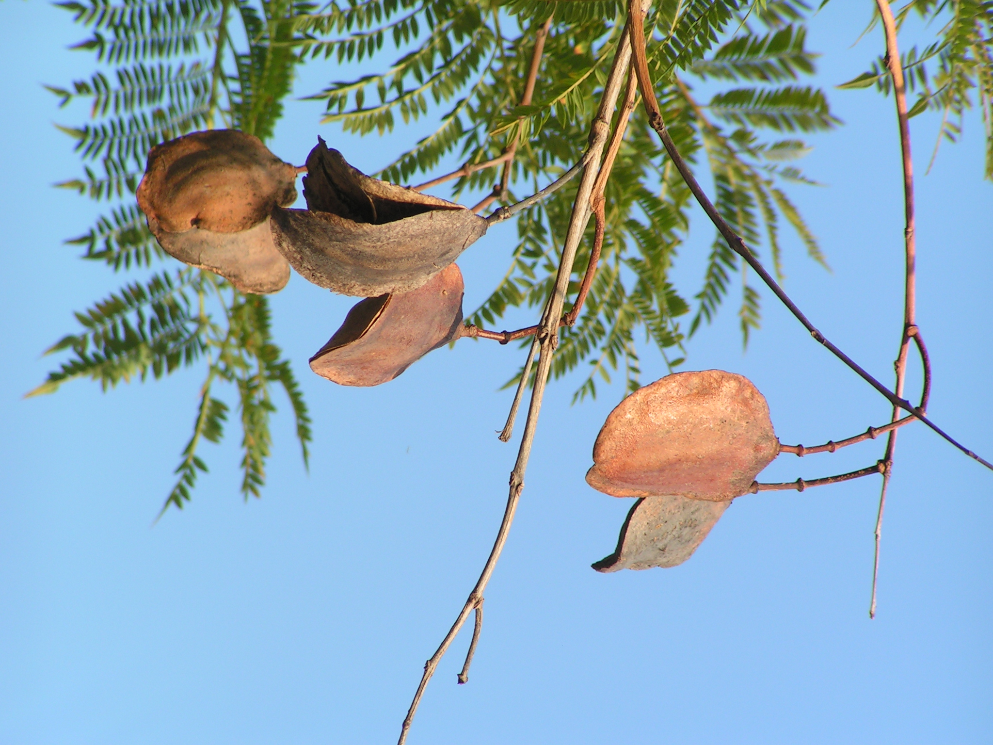 Jacarandá (Jacaranda mimosifolia)